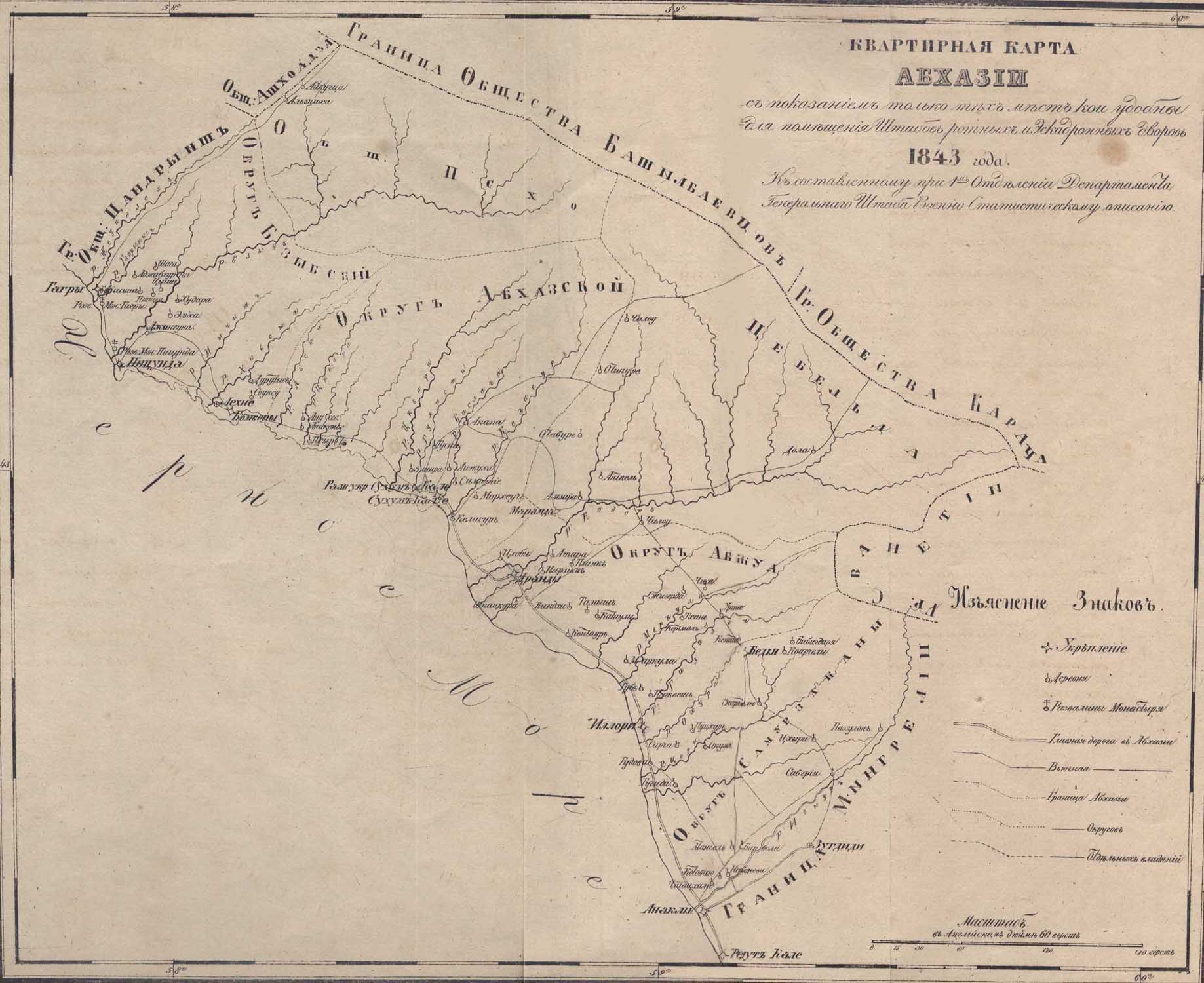 map of Abkhazia